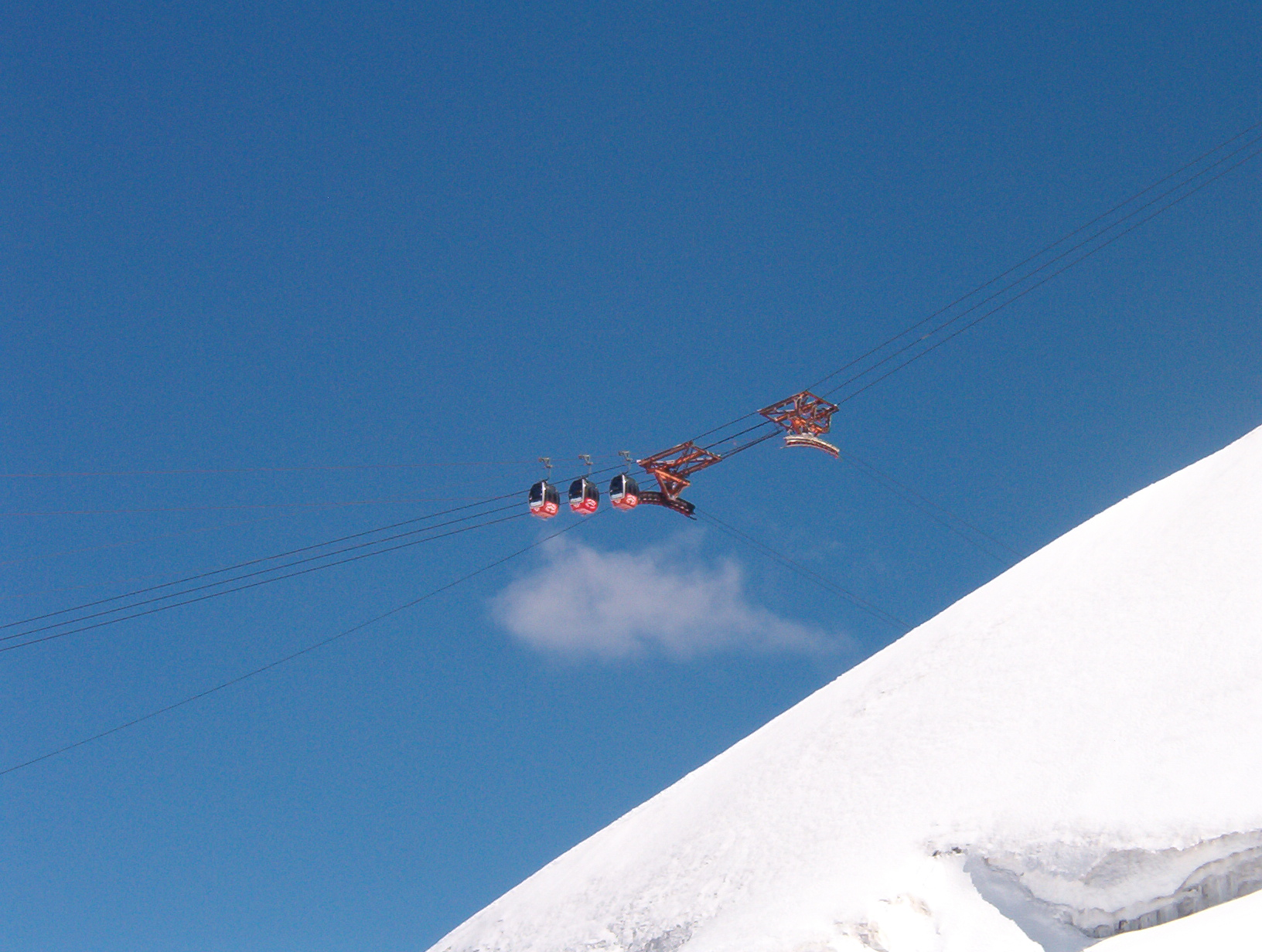 fotografia del pilone aereo della funivia dei ghiacciai sul monte Bianco